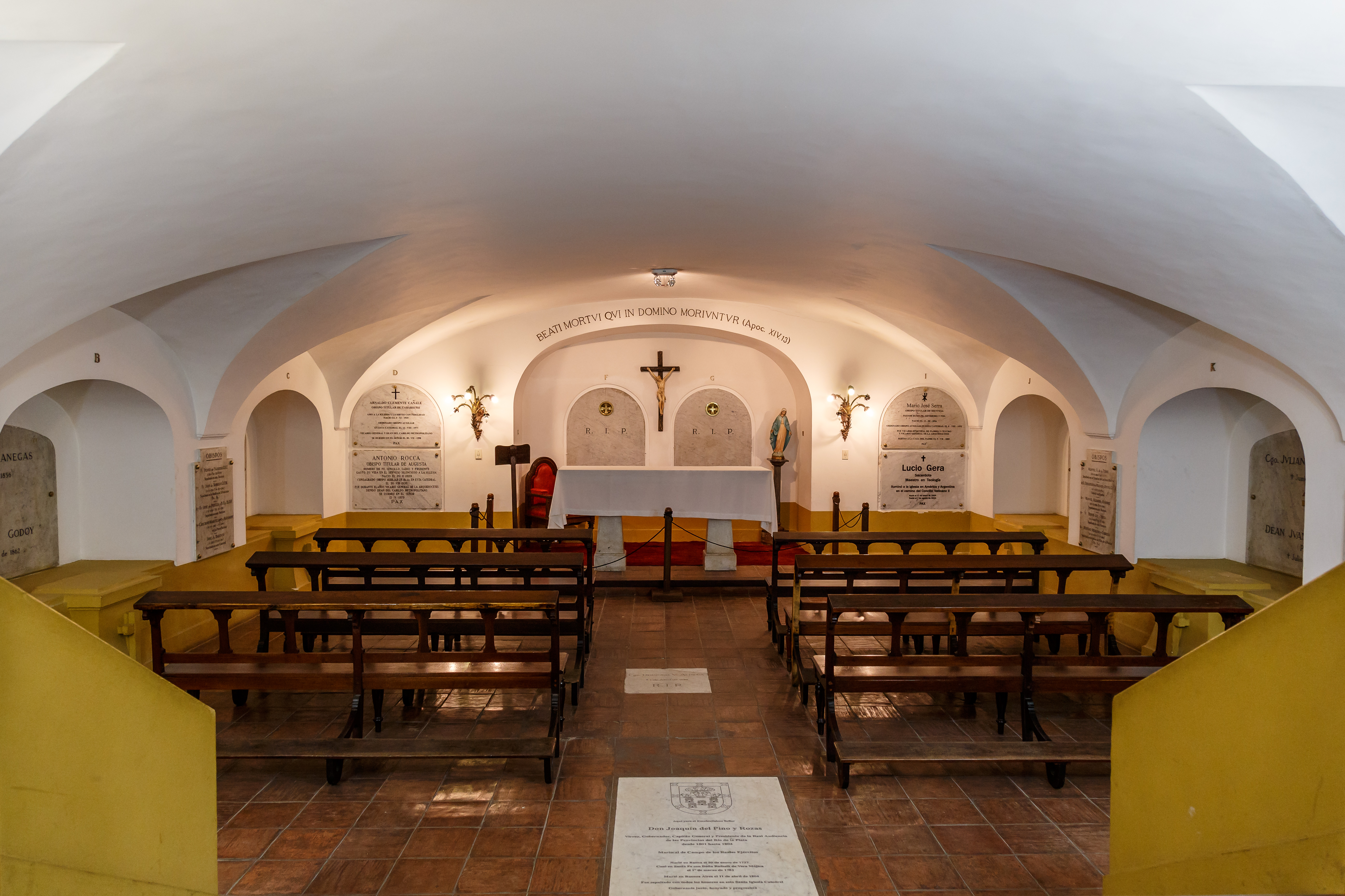 Interior de la Catedral Metropolitana de Buenos Aires. Cripta.